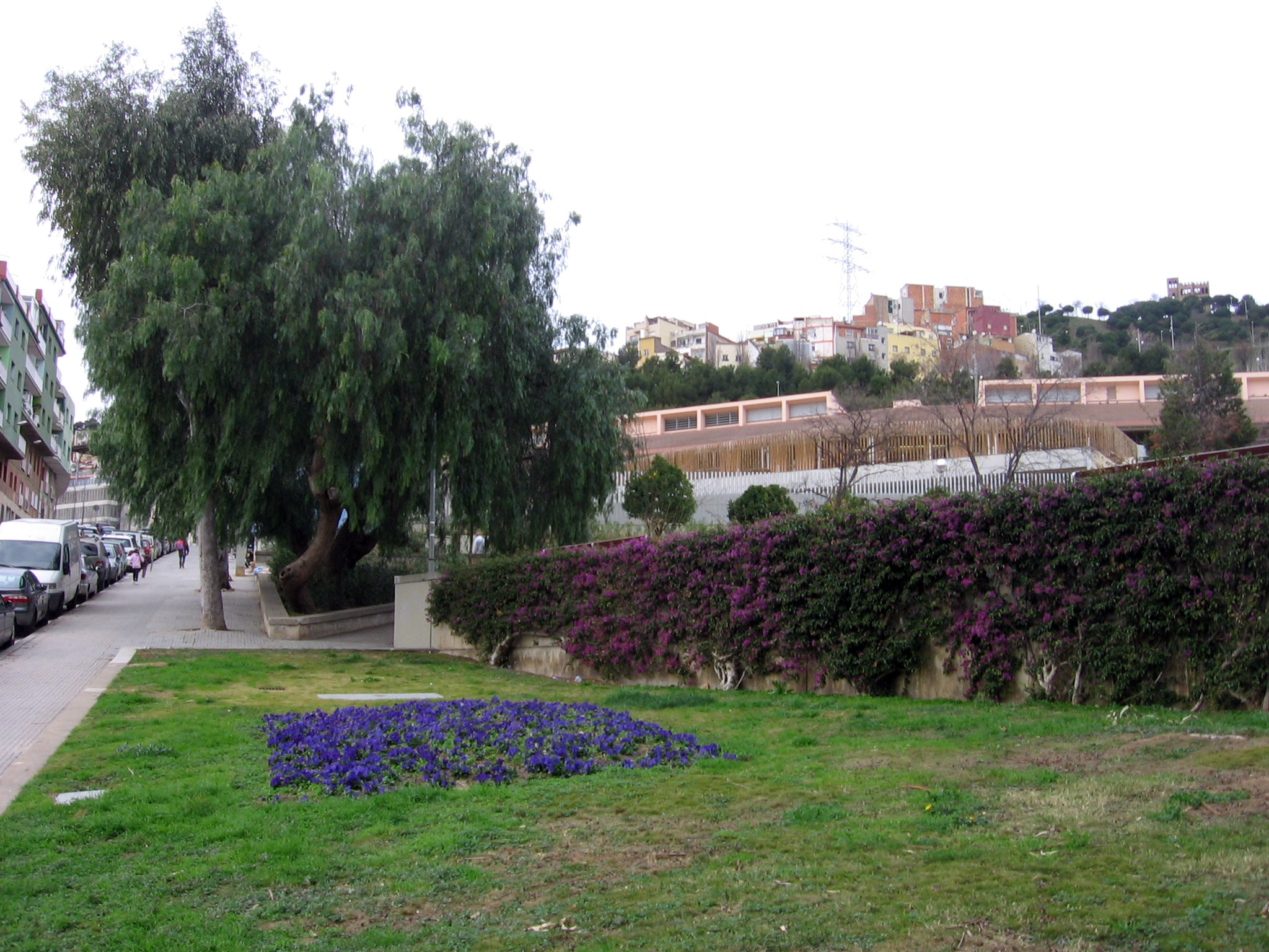 Parque del Pla de Fornells.